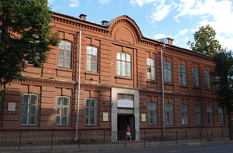 Институт археологии им. А.Х. Халикова АН РТ